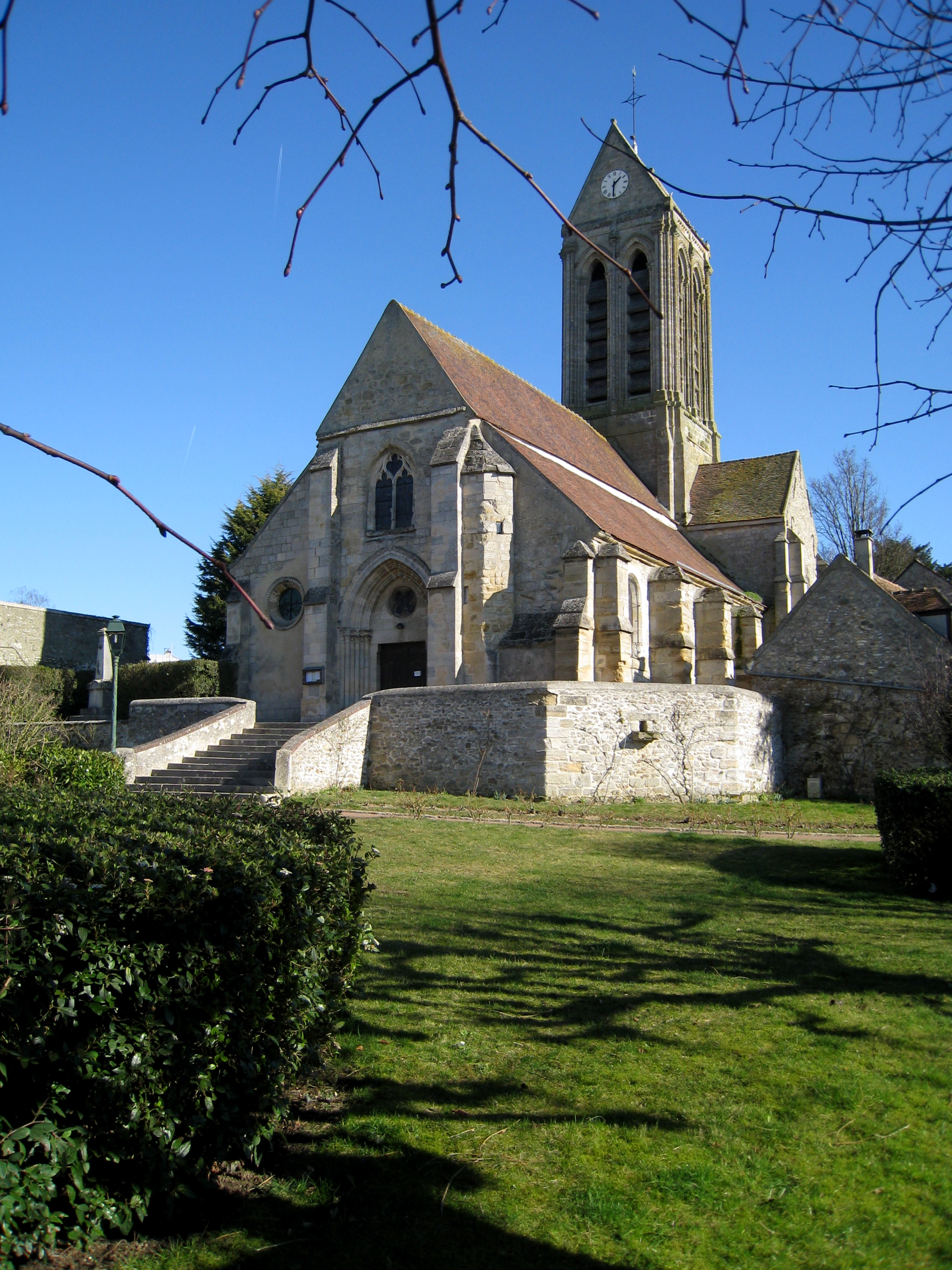 Eglise de Grisy les Plâtres, Val d'Oise, France